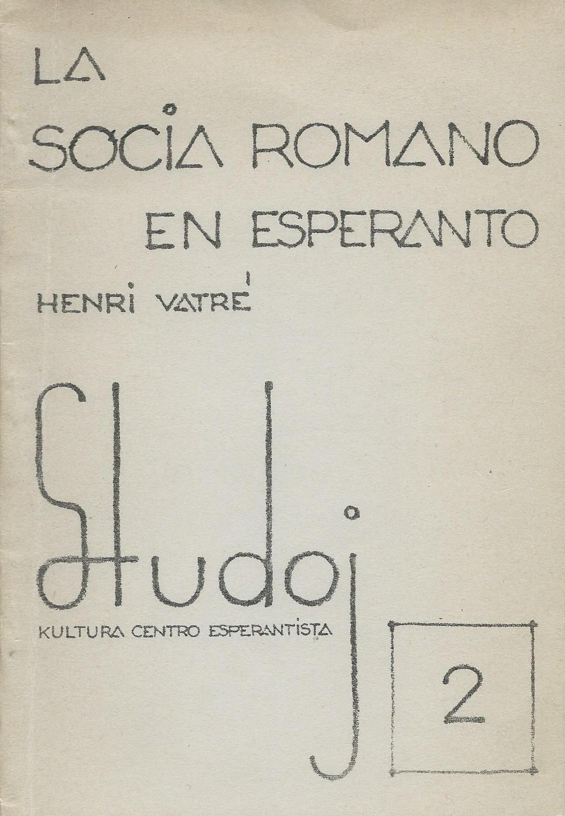 librokovrilo "La Socia Romano en Esperanto", 1973